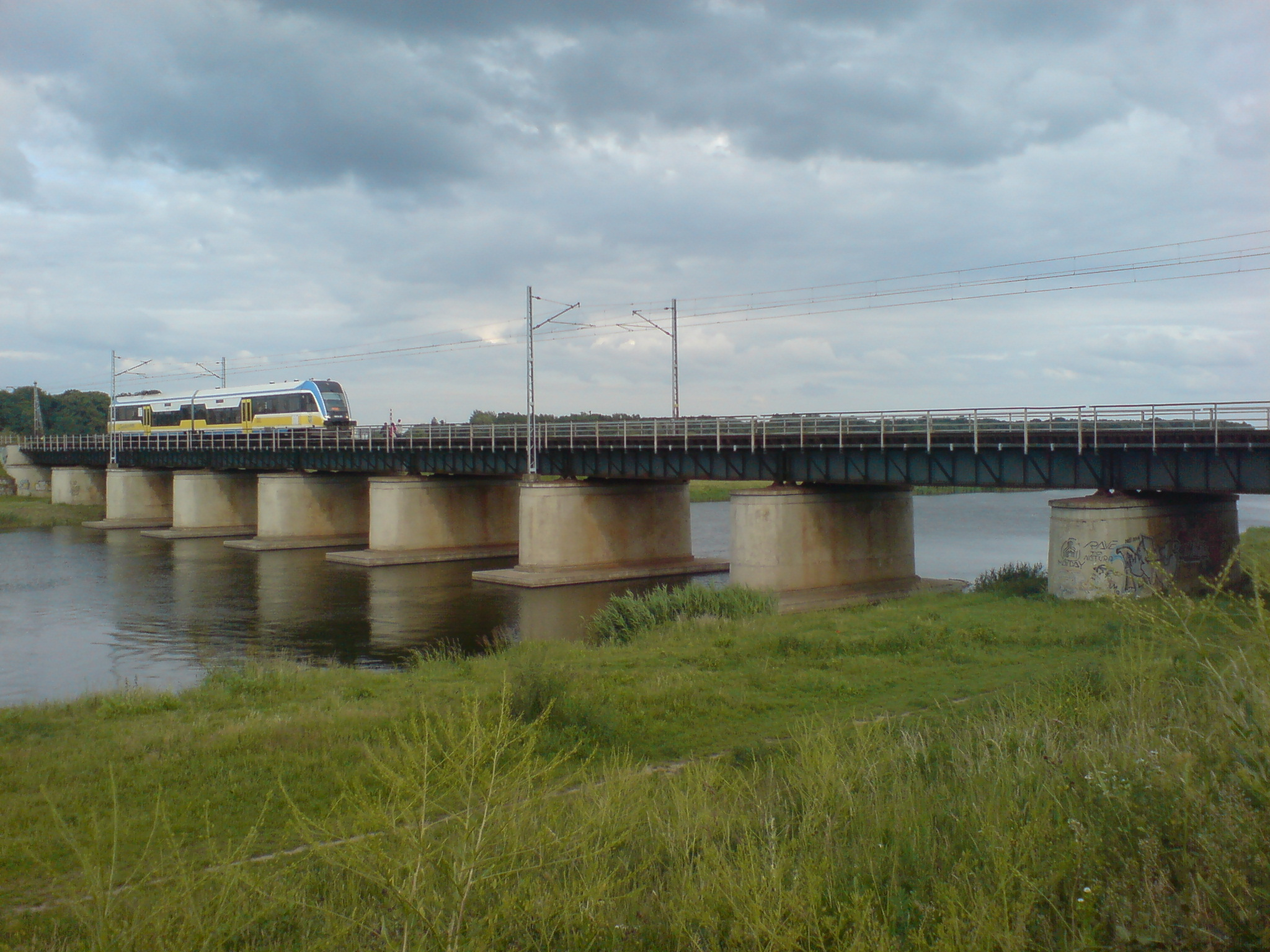 Opole - most kolejowy nad Odrą.jpg